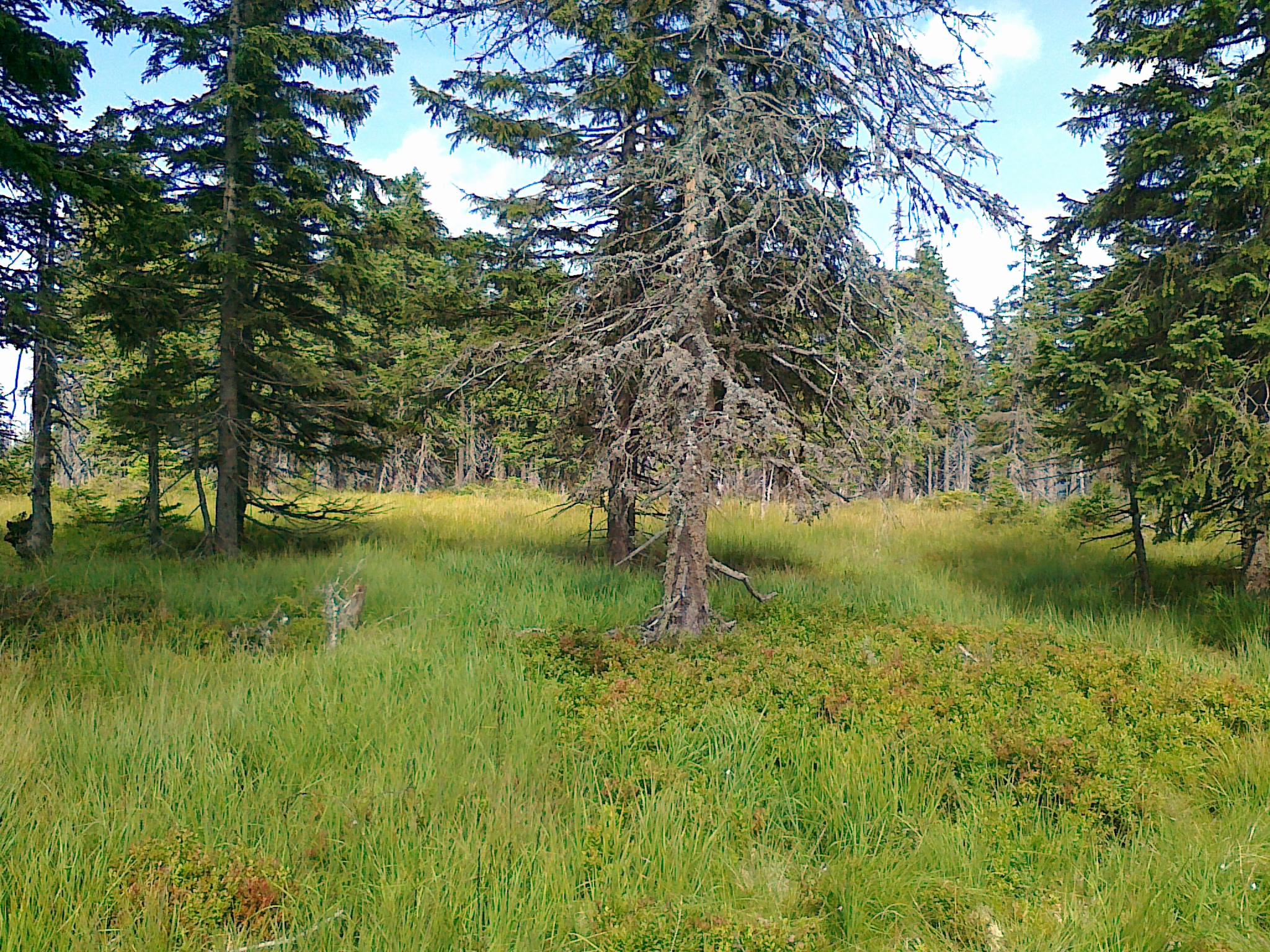 Połać szczytowa (Malá Jezerná)